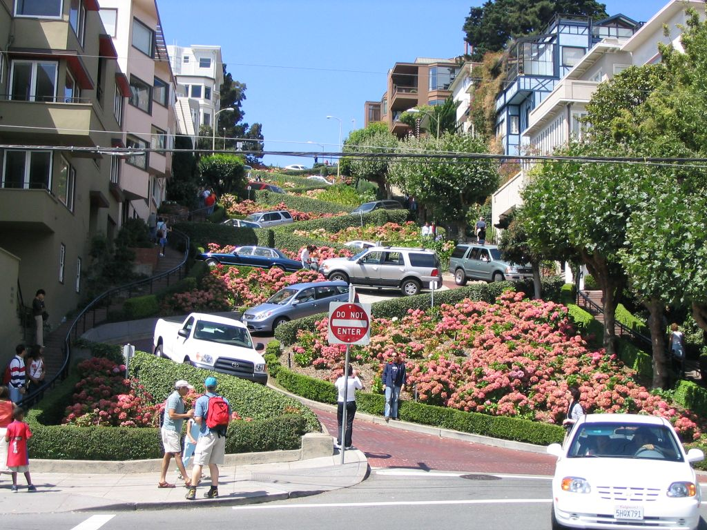 Lombard Street in San Francisco, fotografiert von Ramgeis im August 2004, GNU-FDL